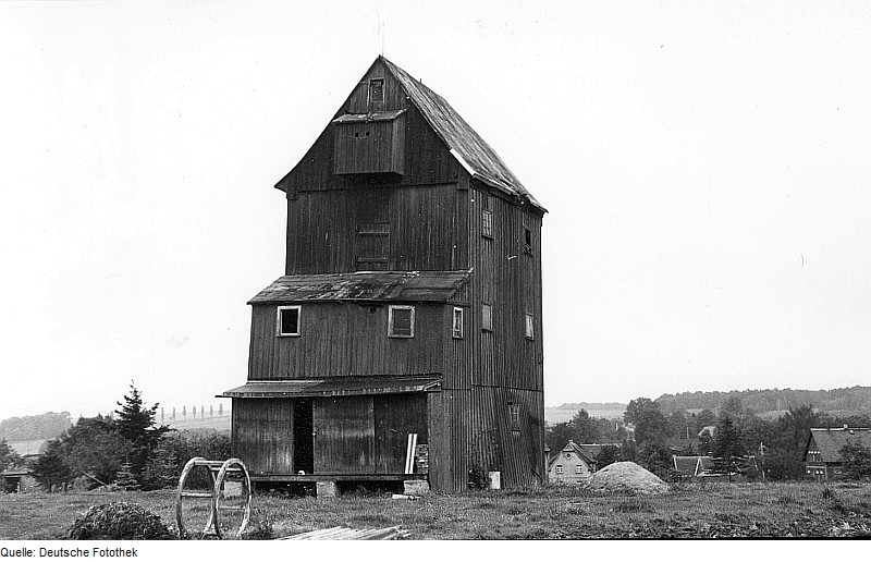 Original image description from the Deutsche Fotothek Eibau-Neueibau. Neumanns- oder Zimmermann-Mühle, Bockmühle